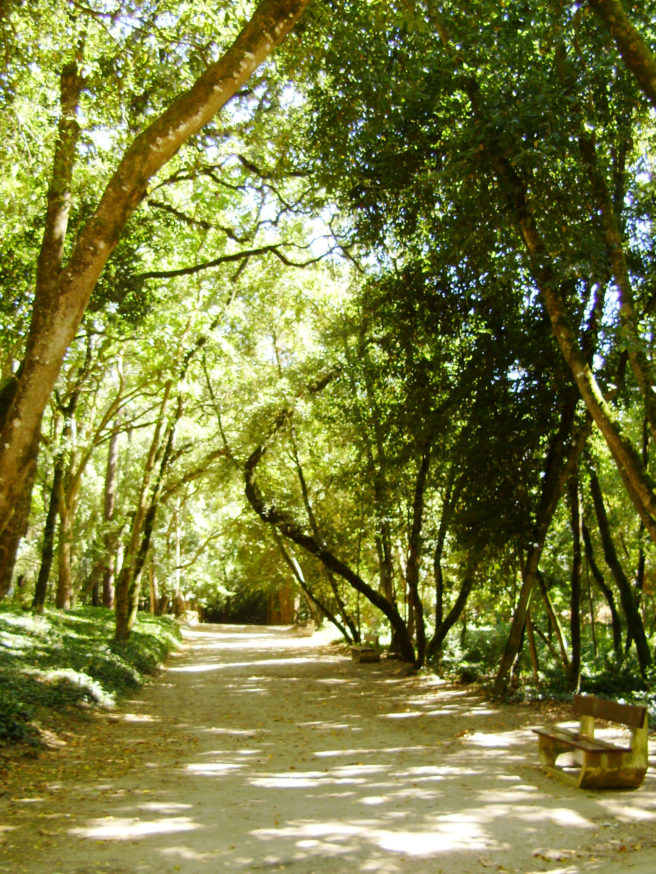 Mata Rainha D. Leonor, Caldas da Rainha, Distrito de Leiria, Portugal.